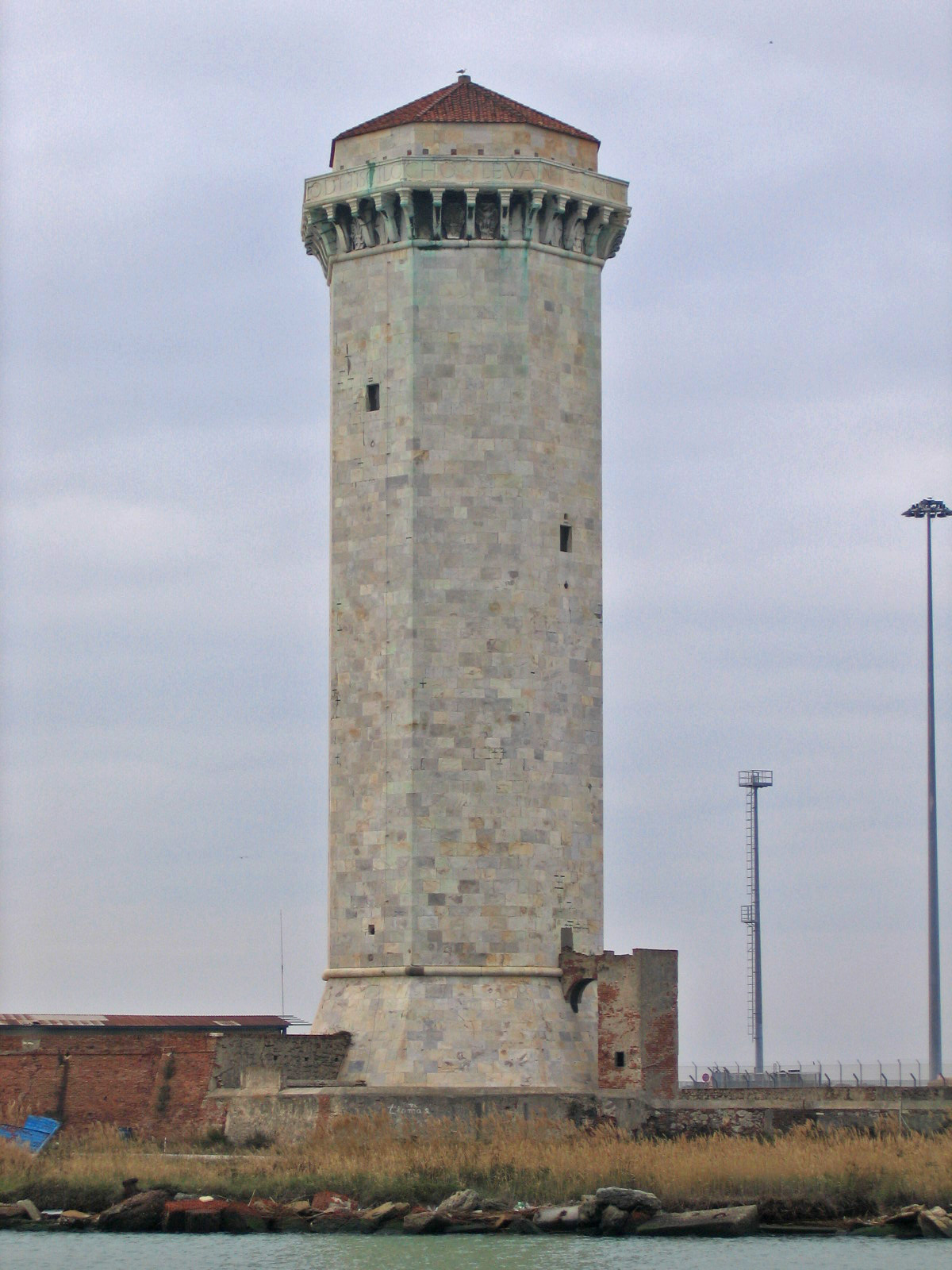 Torre del Marzocco. Livorno